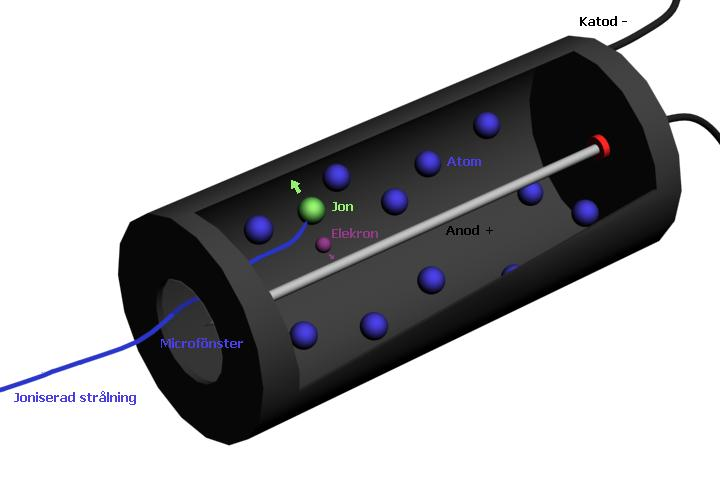 Bilden är skapad av mig, Robert Sundström. Jag tillåter fri användning av den här bilder.